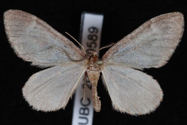 Stamnoctenis pearsalli